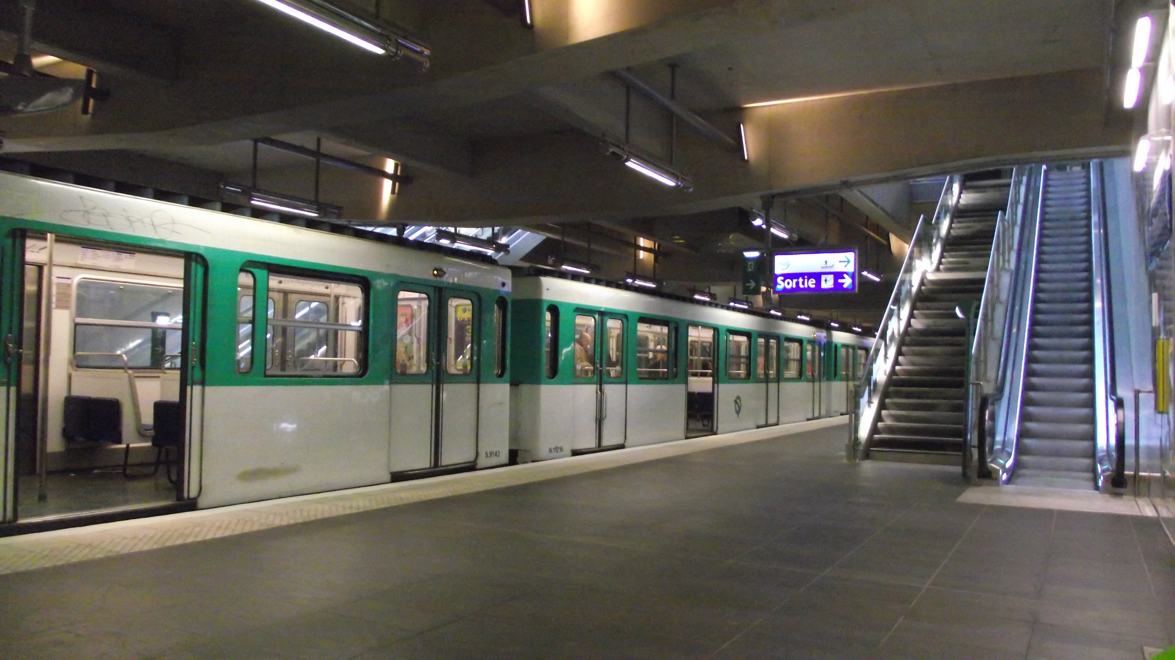 Trein in het station